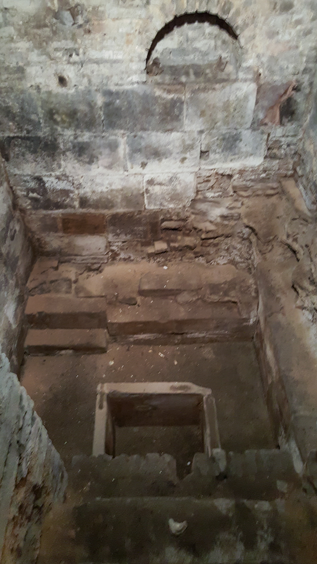 Mikvé médiéval de Strasbourg